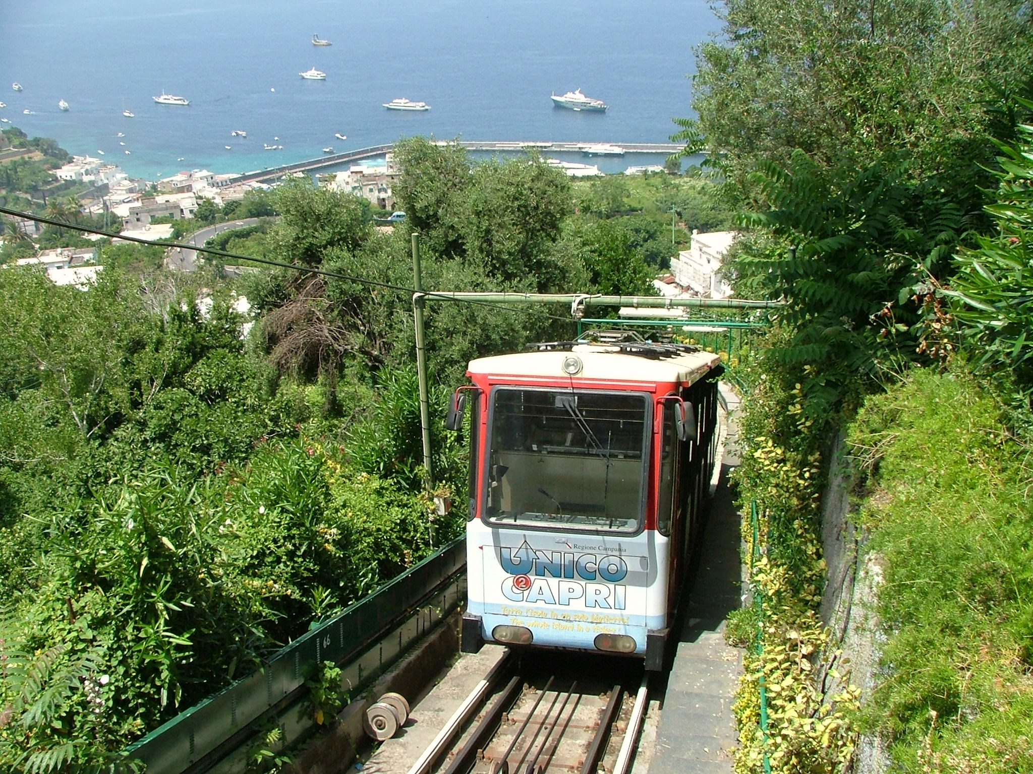 Funikular na Capri.